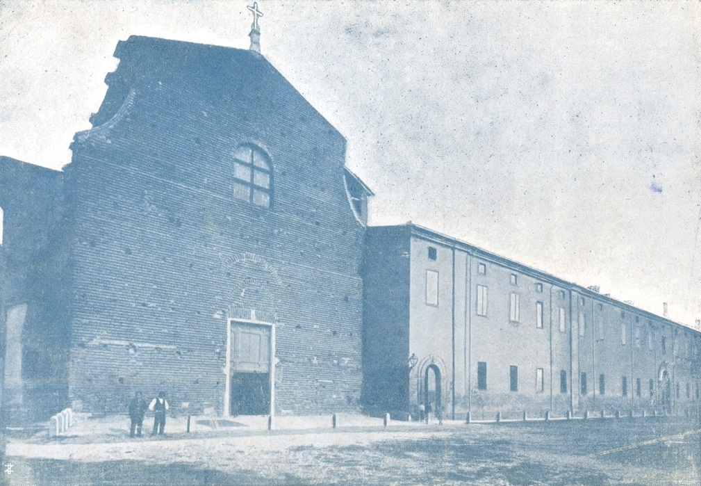 La facciata della Chiesa del Gesù e il Ricovero a Mirandola all'inizio del XX secolo